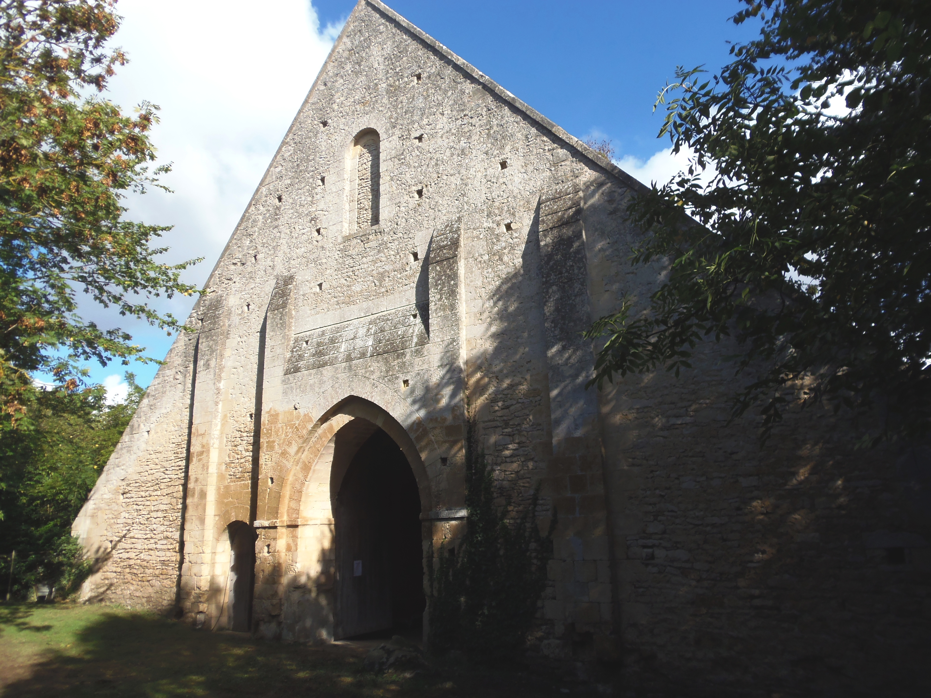 Perrières (Normandie, France). La grange dîmière avant l'incendie de décembre 2013.